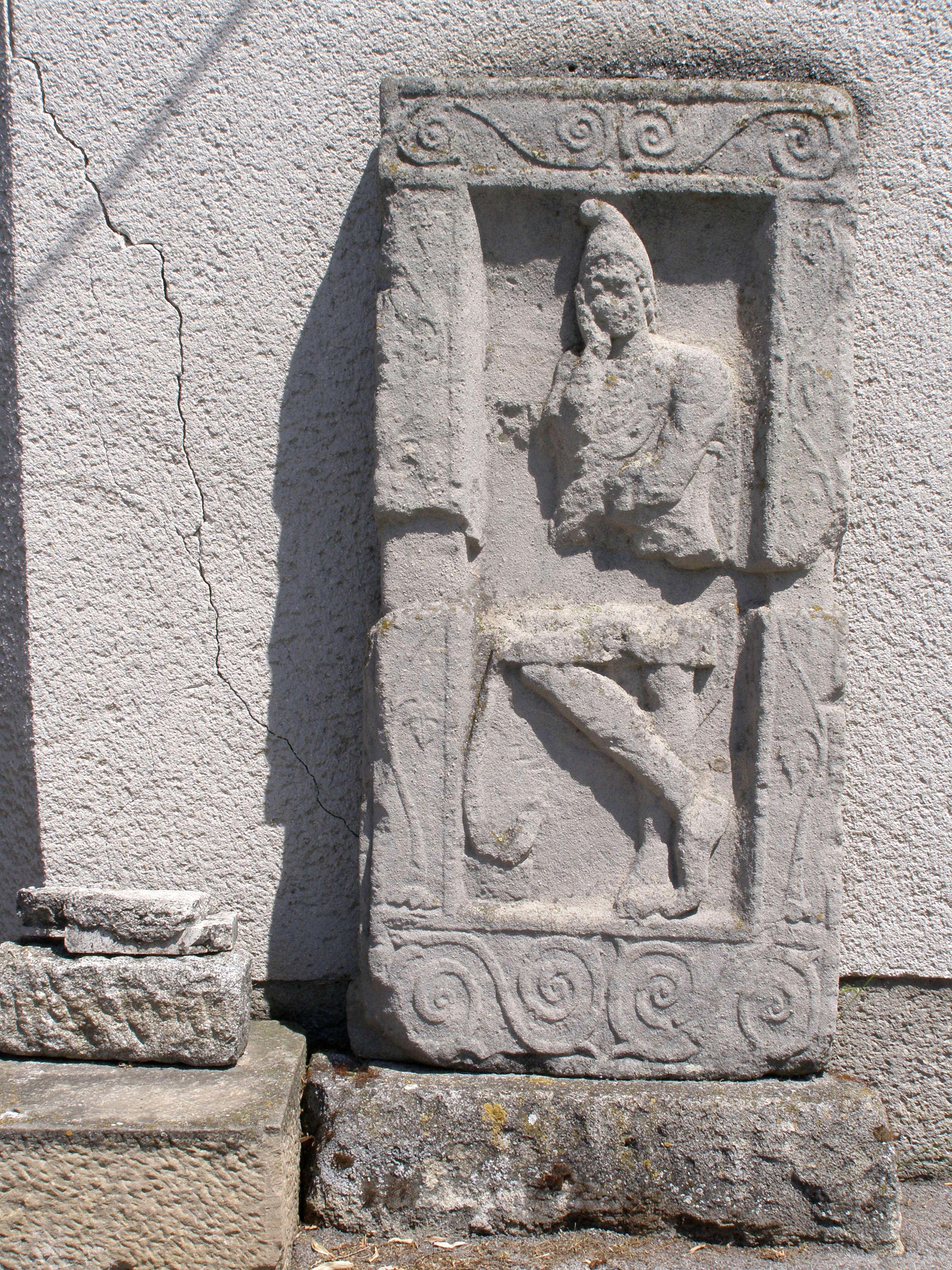 Rímska stéla pred vchodom do expozície